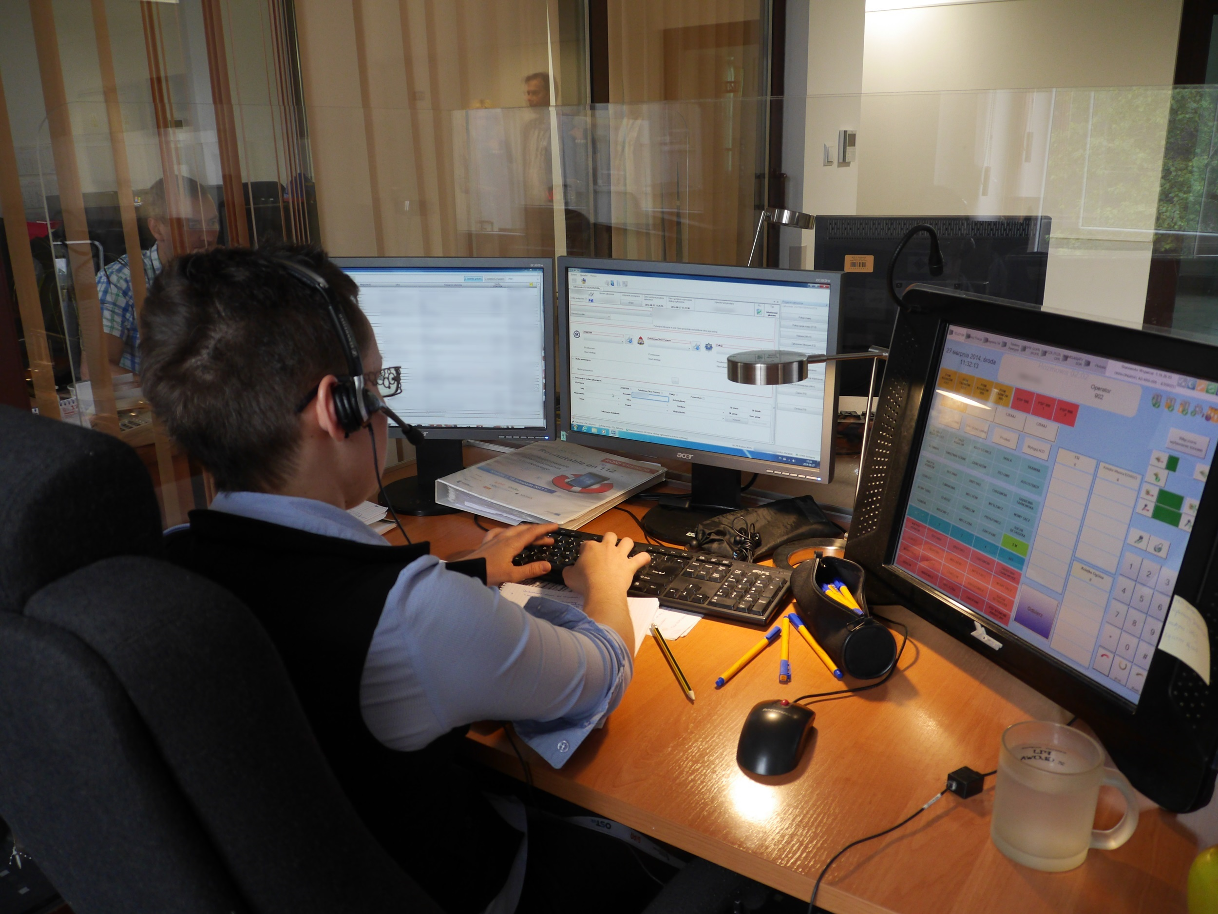 Centrum Powiadamiania Ratunkowego w Krakowie This photo was taken with Panasonic Lumix DMC-GH3 camera, thanks to Panasonic.You can see all photographs in category: Taken with Panasonic Lumix DMC-GH3.